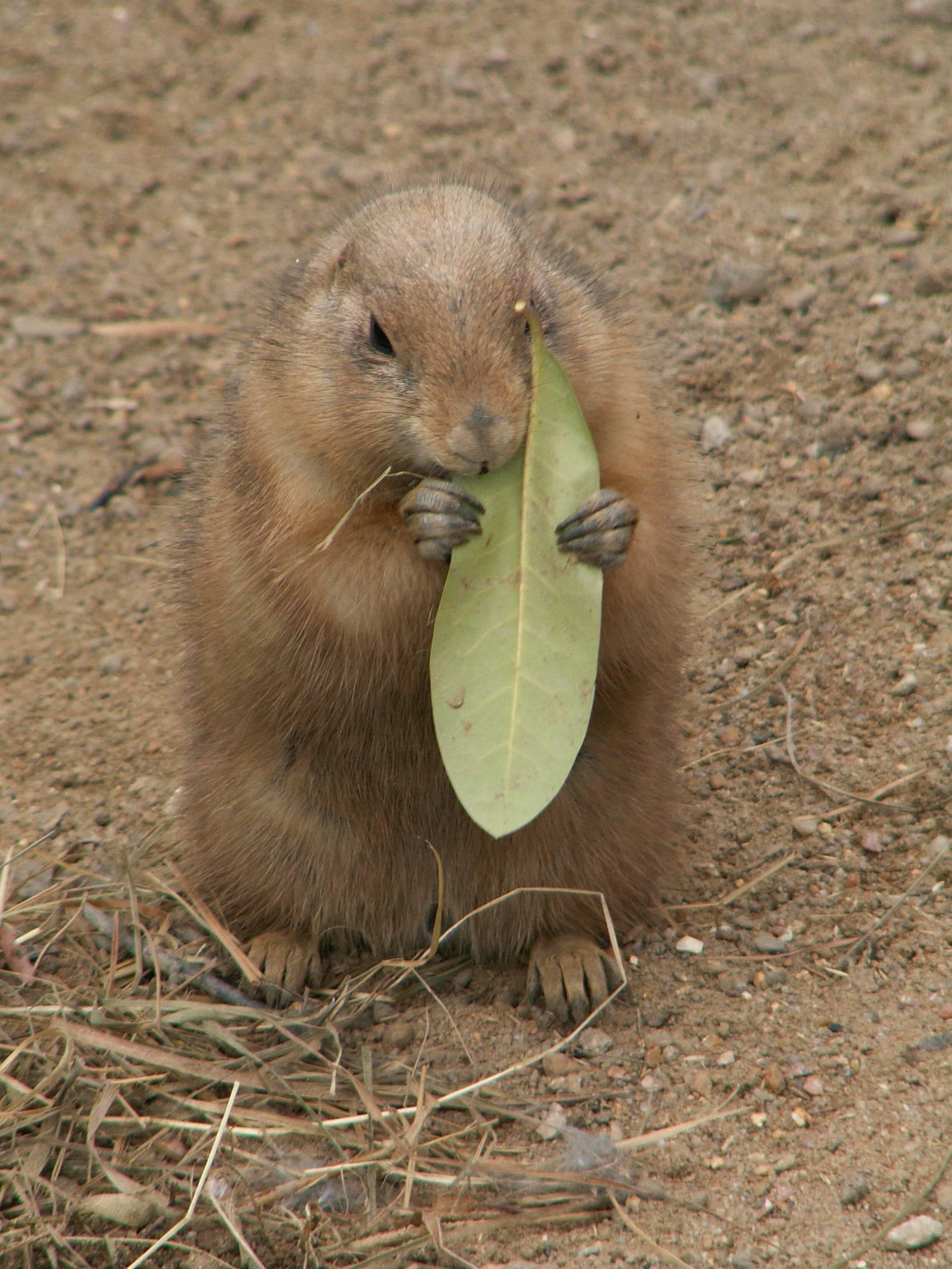 Cynomys, Präriehund, aufgenommen in Hagenbecks Tierpark, Hamburg, Deutschland.